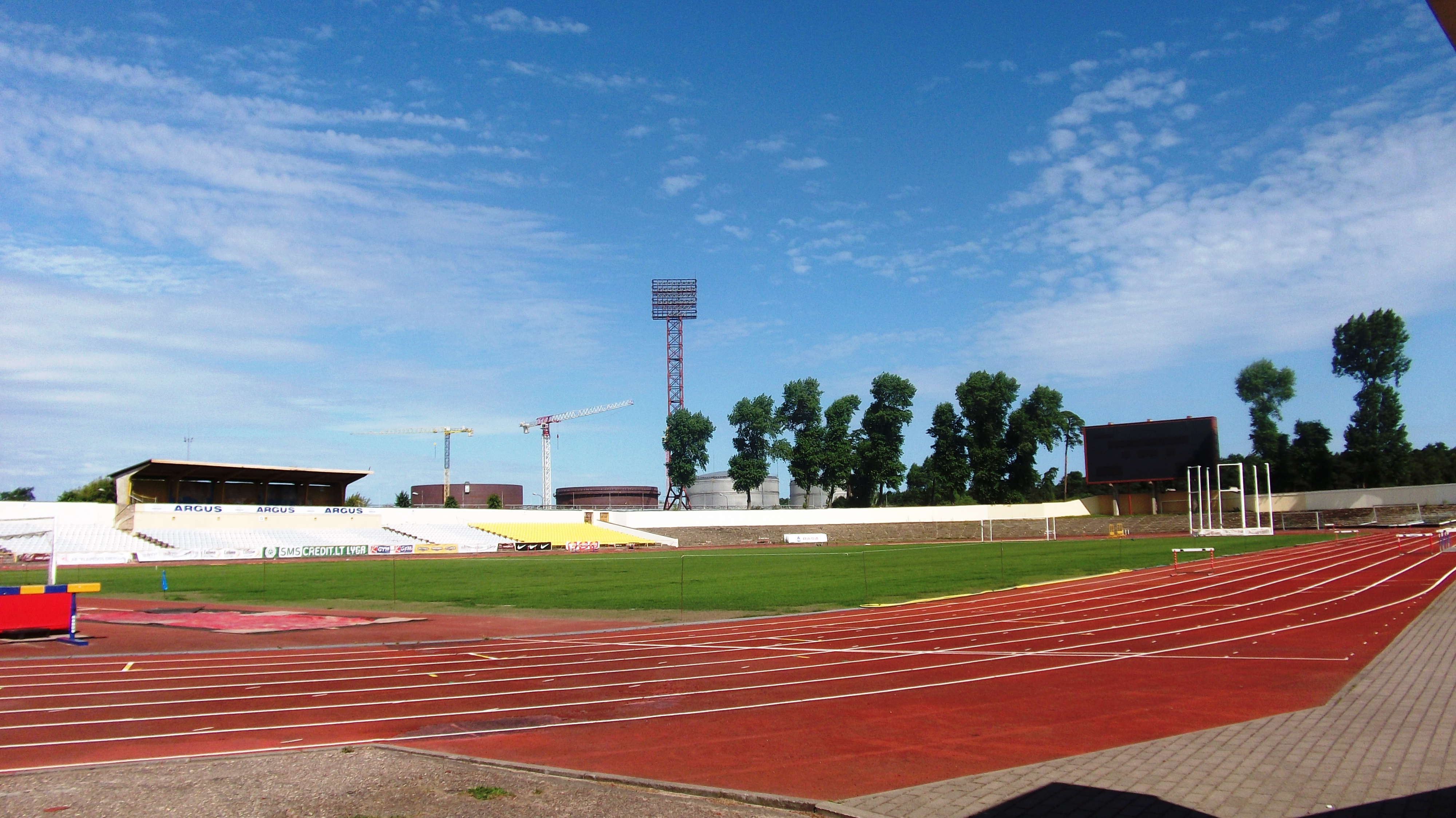 Klaipėdos centrinis stadionas